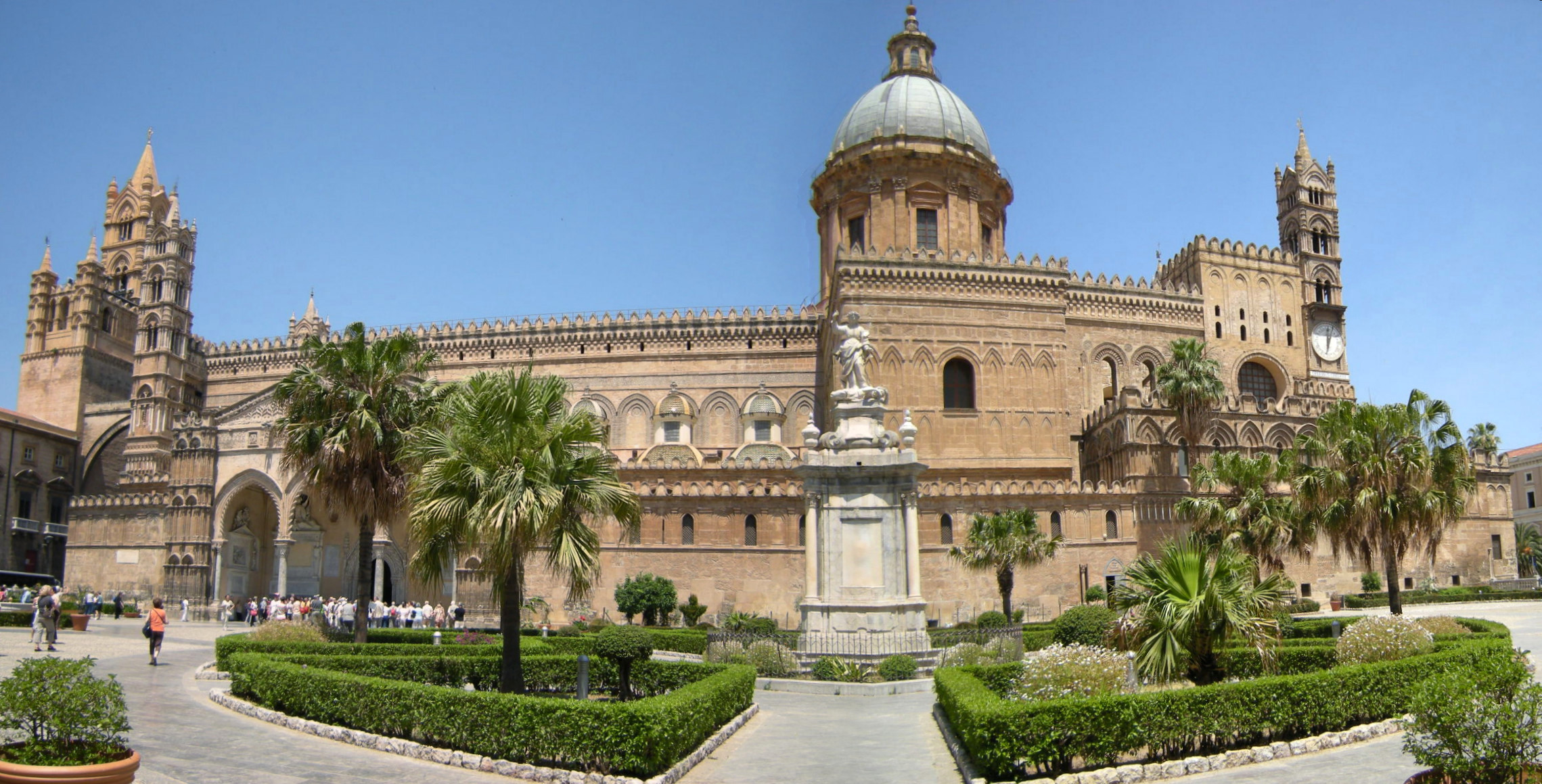 Foto panorâmica